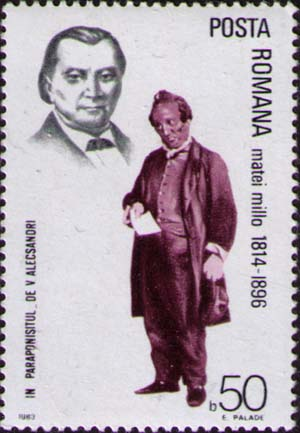 Актер Матей Милло в спектакле «Недовольный». Почтовая марка Румынии. Серия: Румынские актеры 1983, 50 B. П. глубокая. 13 (1/4). многоцветная. Каталоги: Michel: 3941 Scott: 3120 Stanley Gibbons: 4777 Yvert et Tellier: 3434